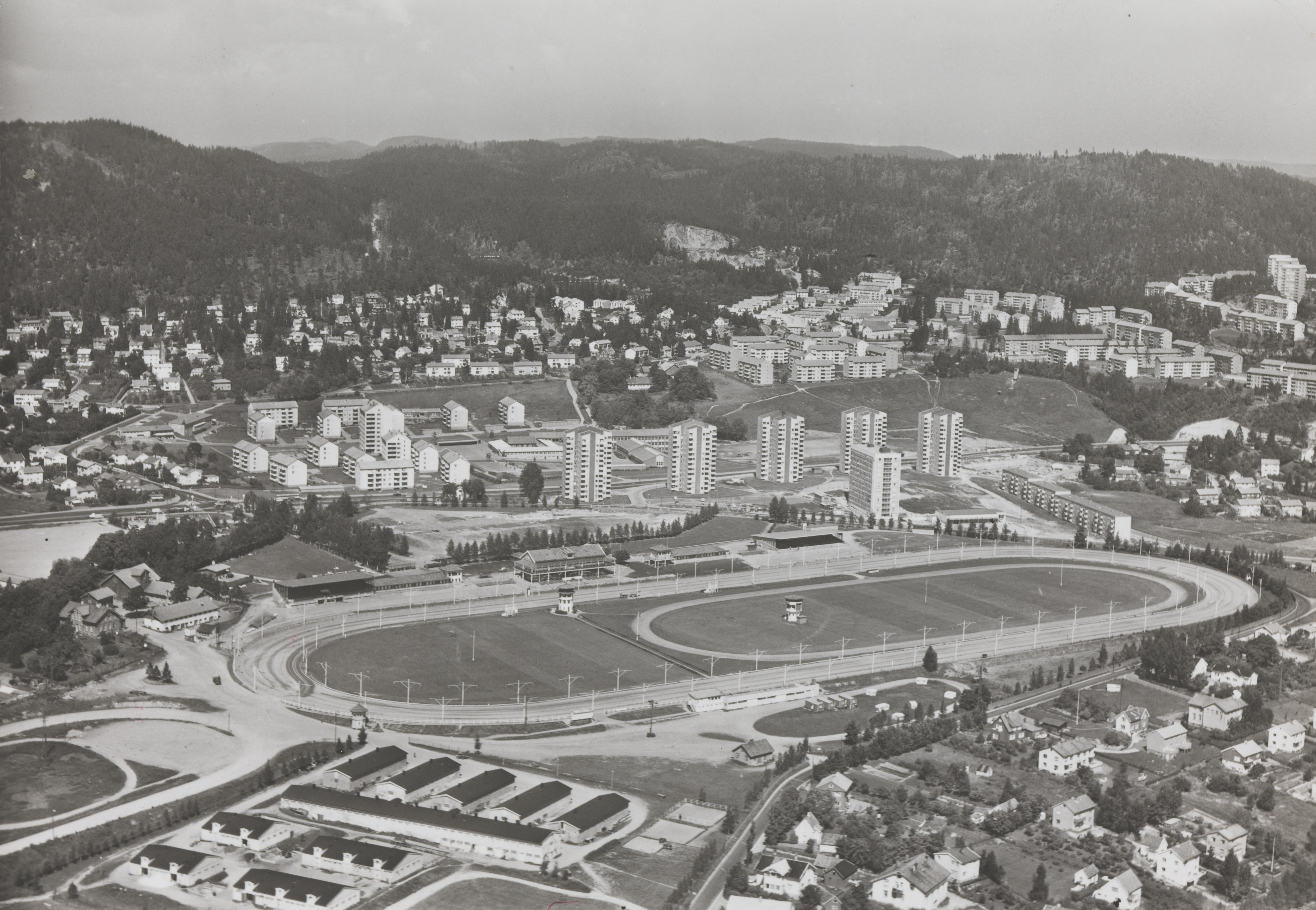 Bildet er hentet fra Nasjonalbibliotekets bildesamling Bjerkebanen, Oslo, Oslo